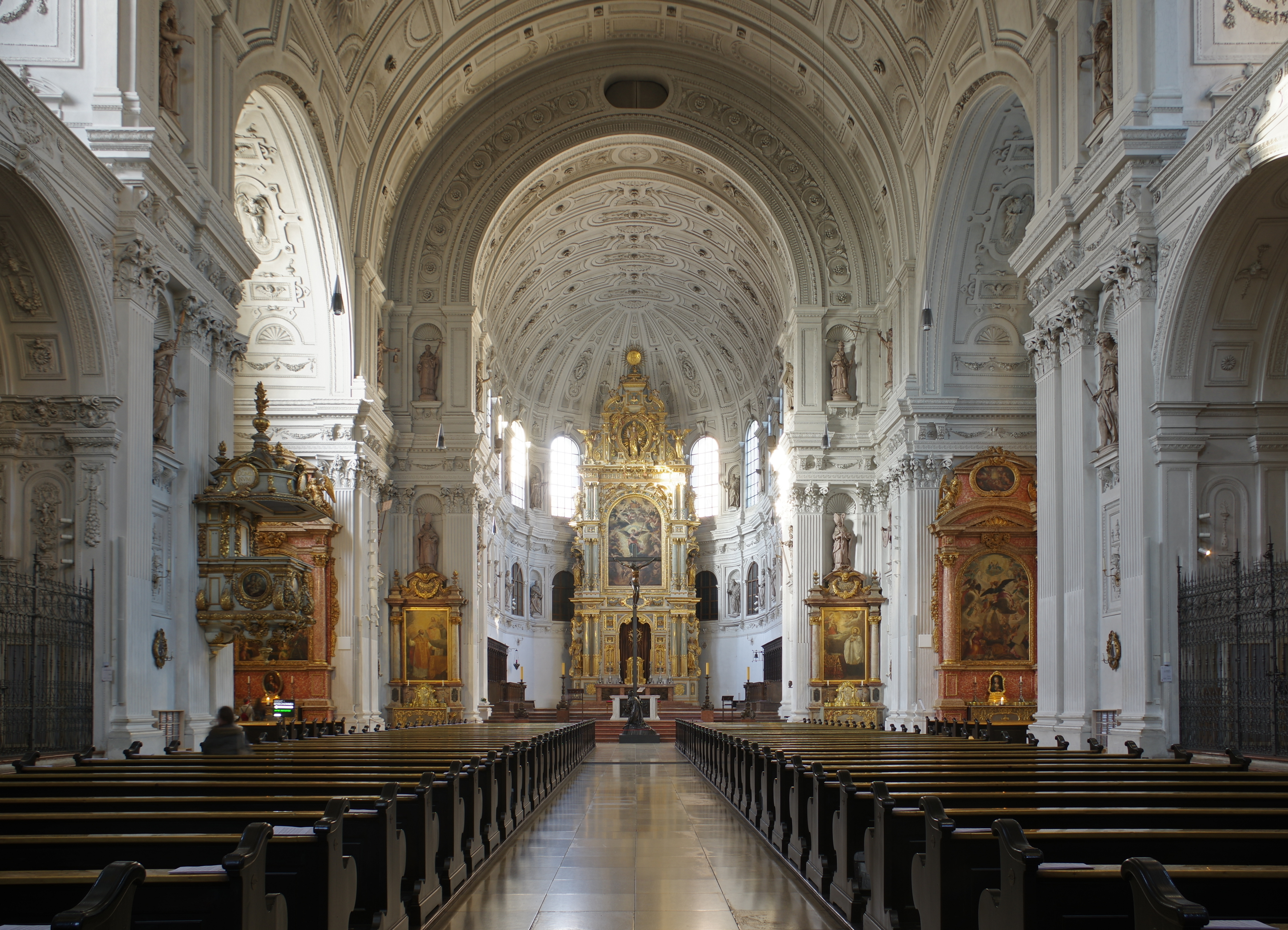 München,Neuhauser Straße 6, Jesuitenkirche St. Michael, Akten-Nr. D-1-62-000-4718